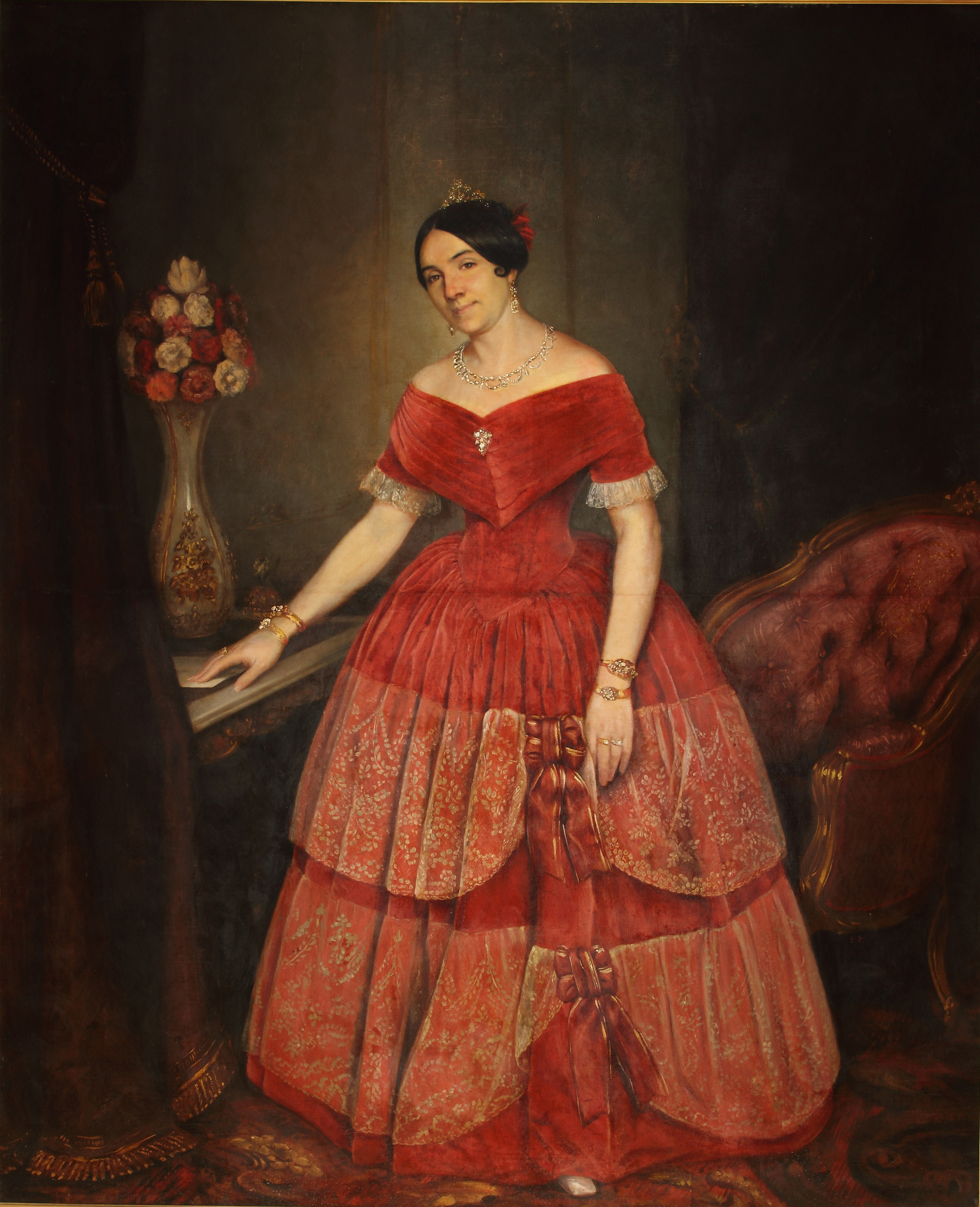 Prilidiano Pueyrredón, Retrato de Manuelita Rosas. 1851. 199 x 166 cm, con marco: 222,5 x 186,5 x 7 cm, óleo sobre tela. Inv. 3188.